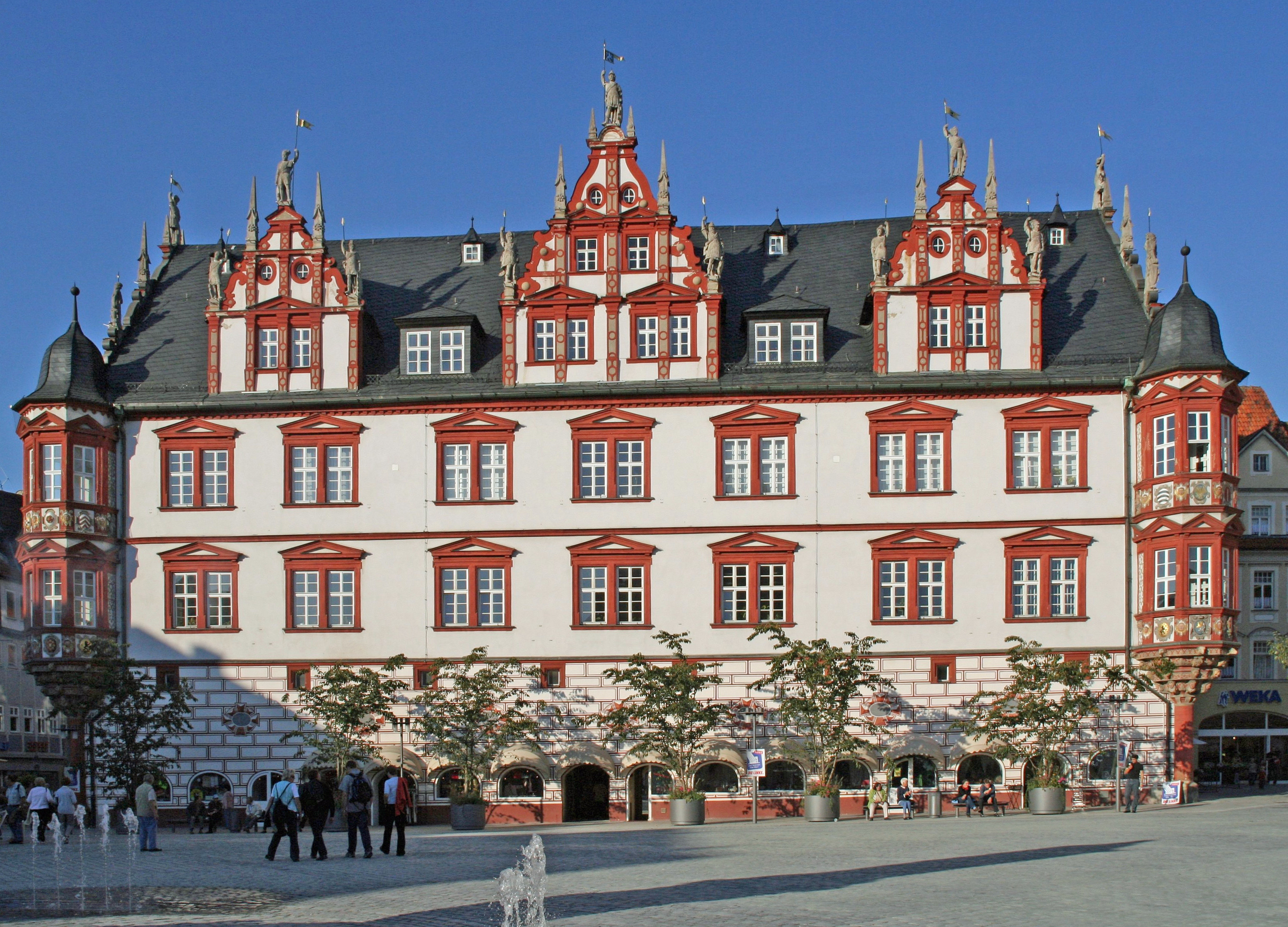 Stadthaus am Marktplatz, Coburg (Germany)